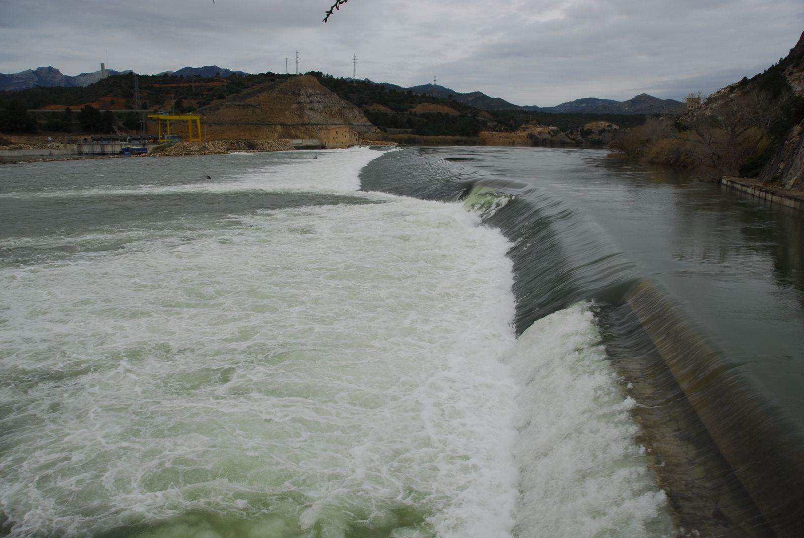 Assut de Xerta durant una riuada